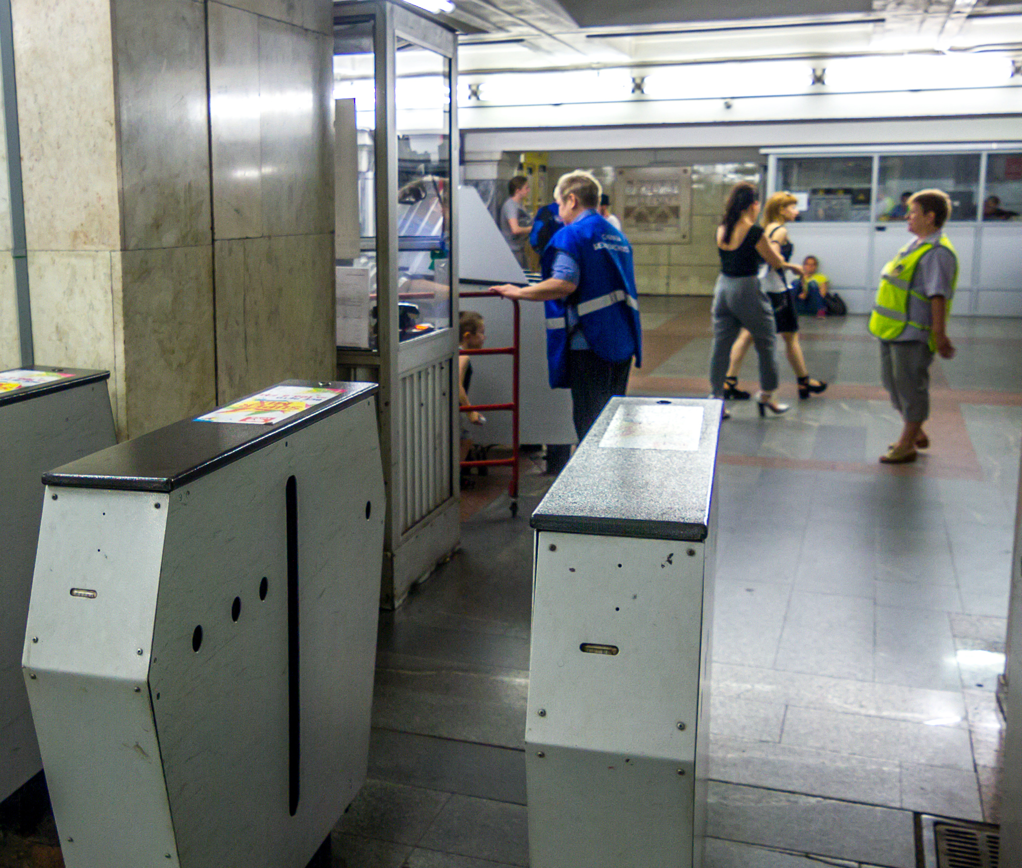 Сокольники (станция метро)